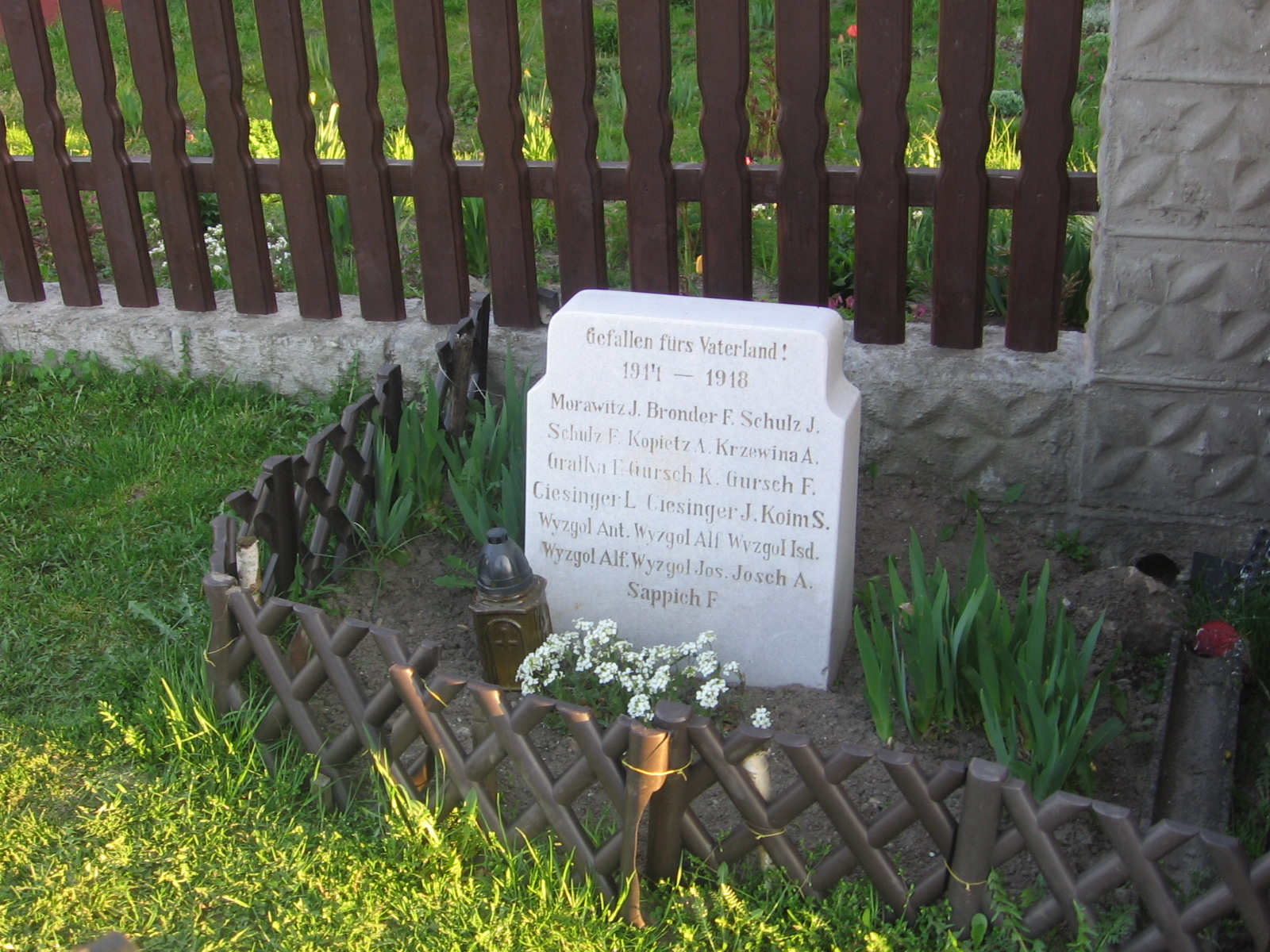 Tablica pamiątkowa - tablica pamiątkowa poświęcona mieszkańcom Ciochowic poległym w czasie I wojny światowej.